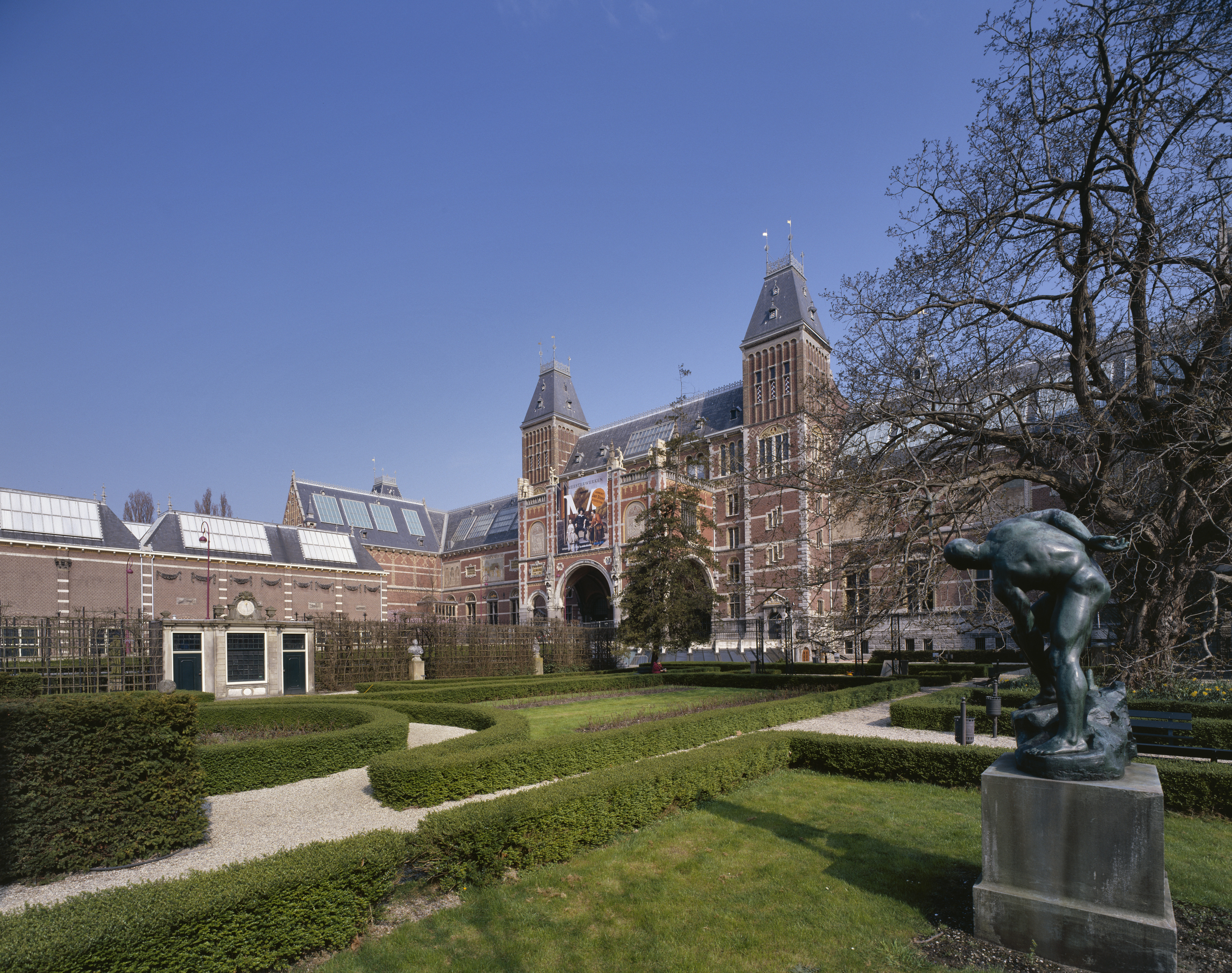 Rijksmuseum: Overzicht tuin, met geschoren buxushagen, en op achterzijde van het Rijksmuseum (opmerking: Gefotografeerd voor Monumenten In Nederland Noord-Holland)